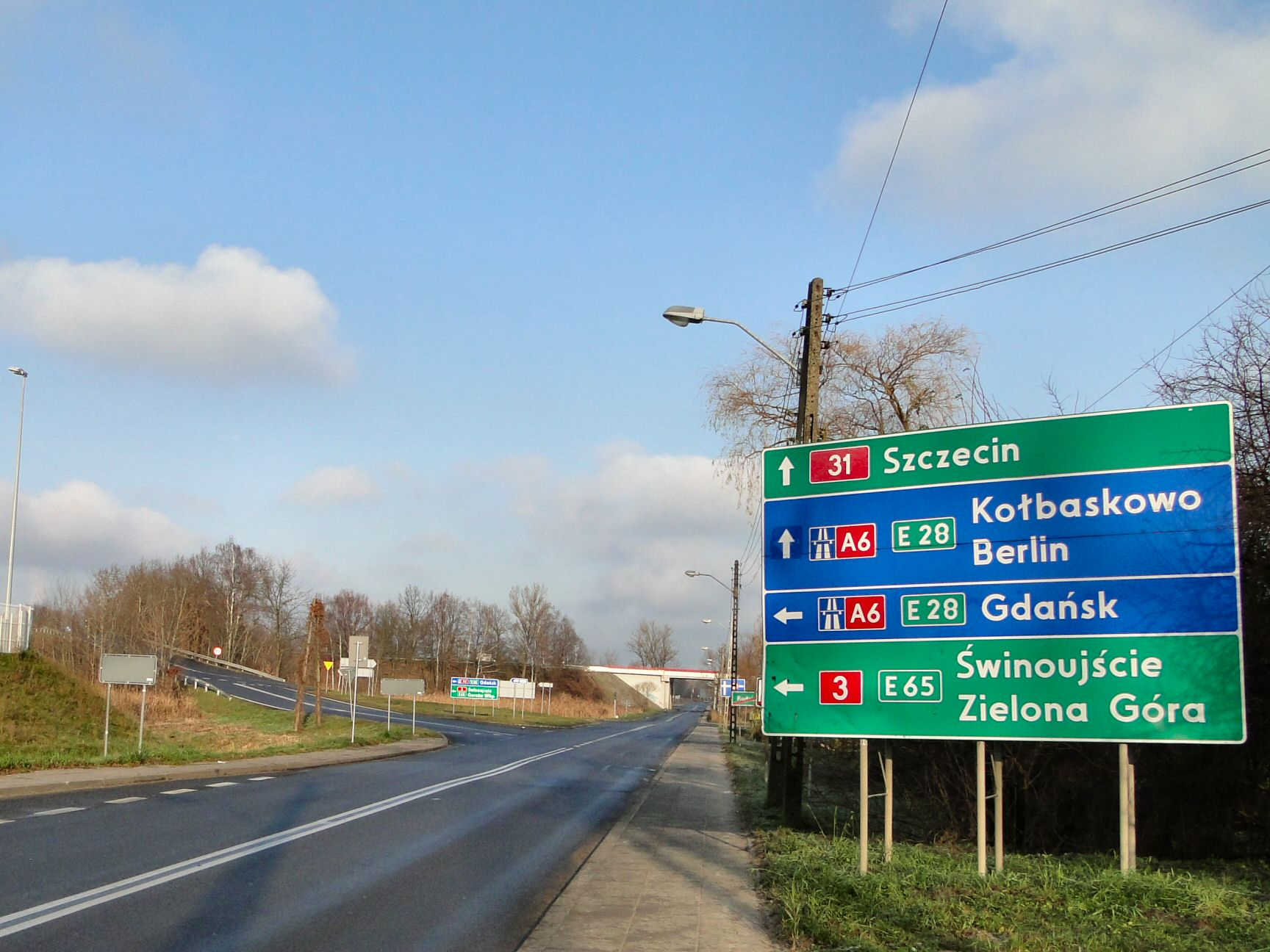 Szczecin Kluczewko - skrzyżowanie autostrady A6 z drogą krajową nr 31